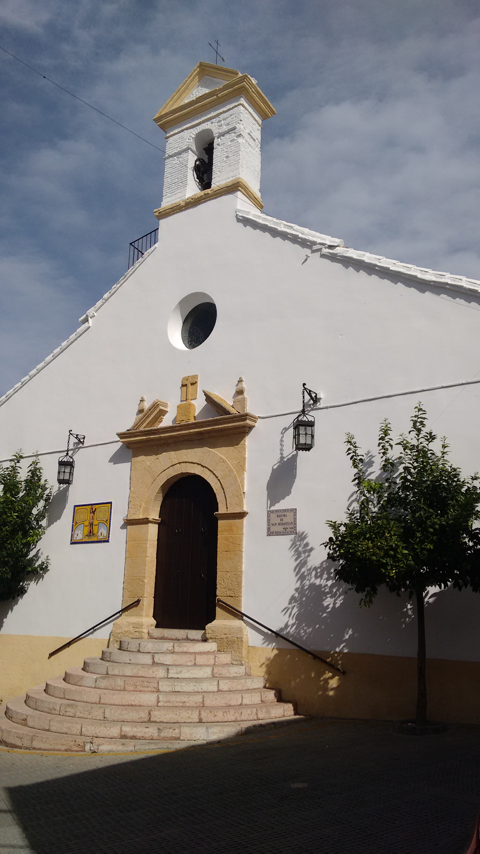 Parroquia de San Sebastián, edificio más antiguo de Montilla, que data del siglo XIII